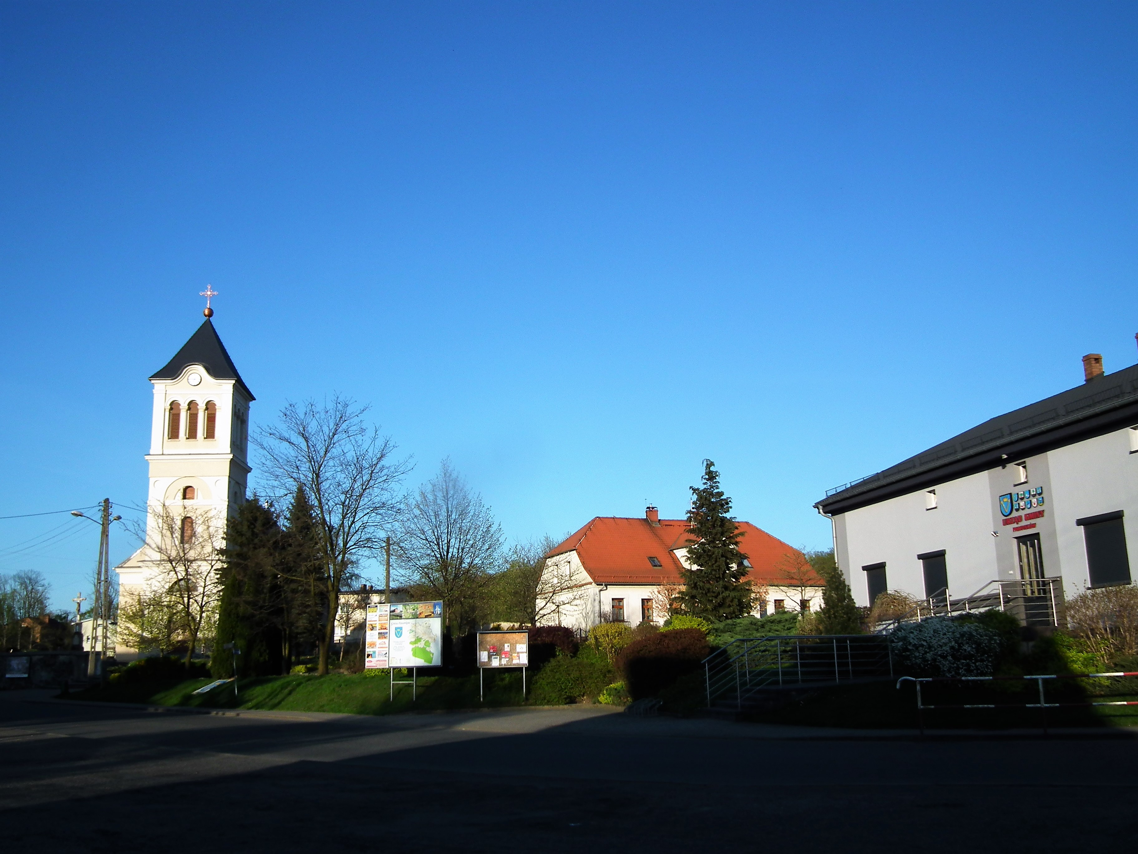 Centrum wsi Pawonków.